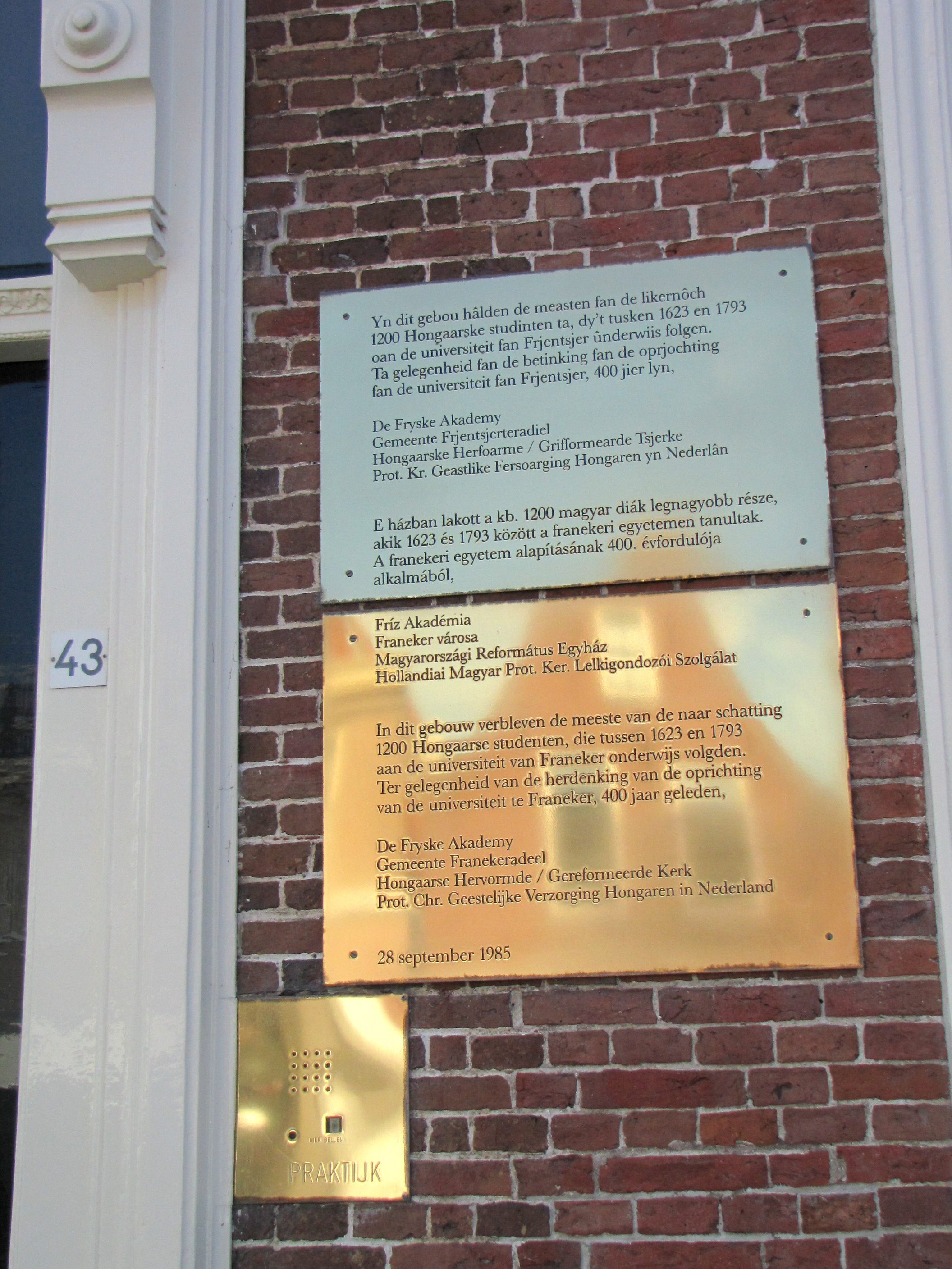 Franeker, Voorstraat 43.